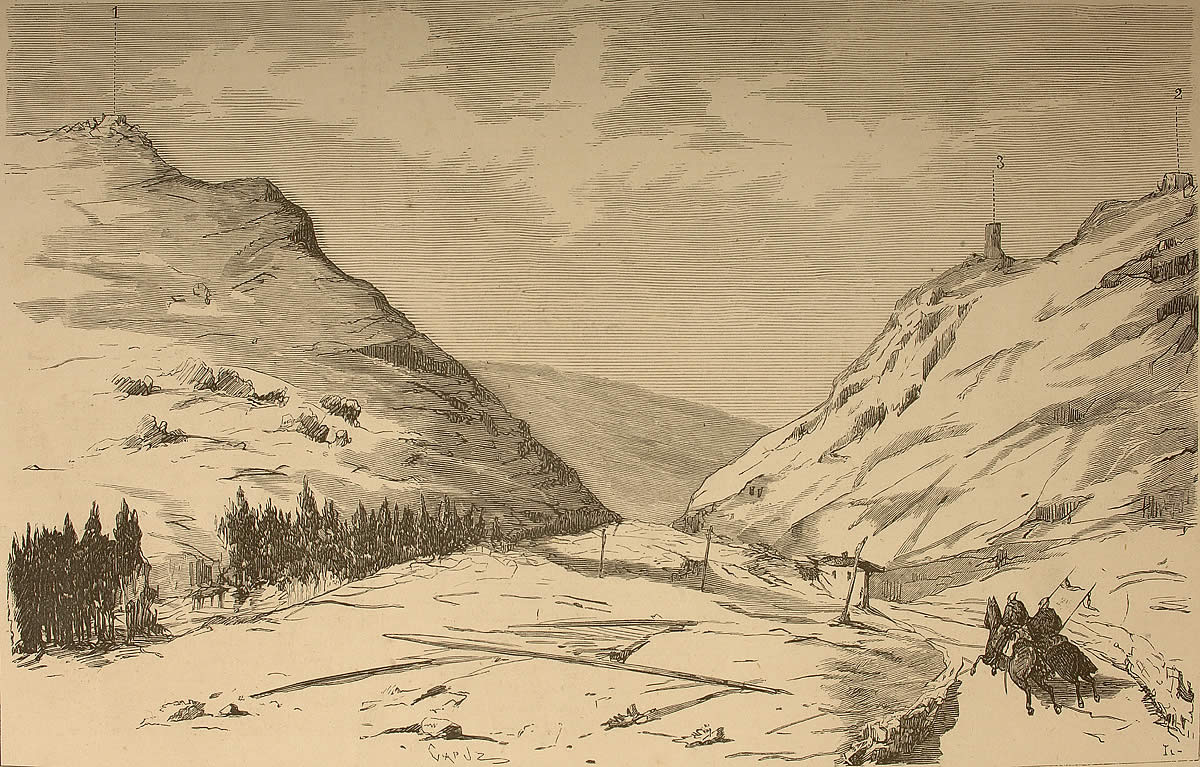 Arabako Argantzungo haitzartea 1875